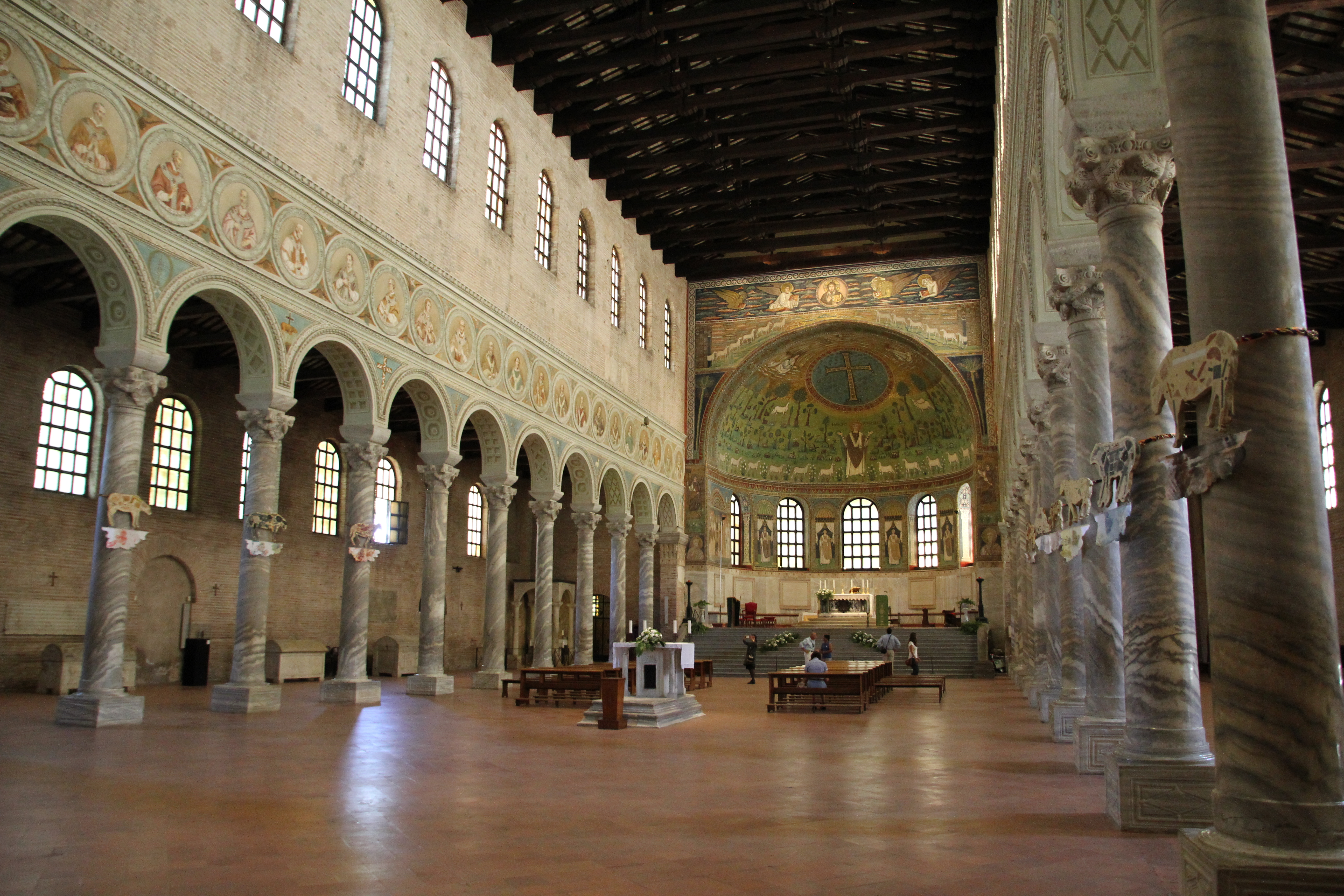 Ravenna, basilica di Sant'Apollinare in Classe